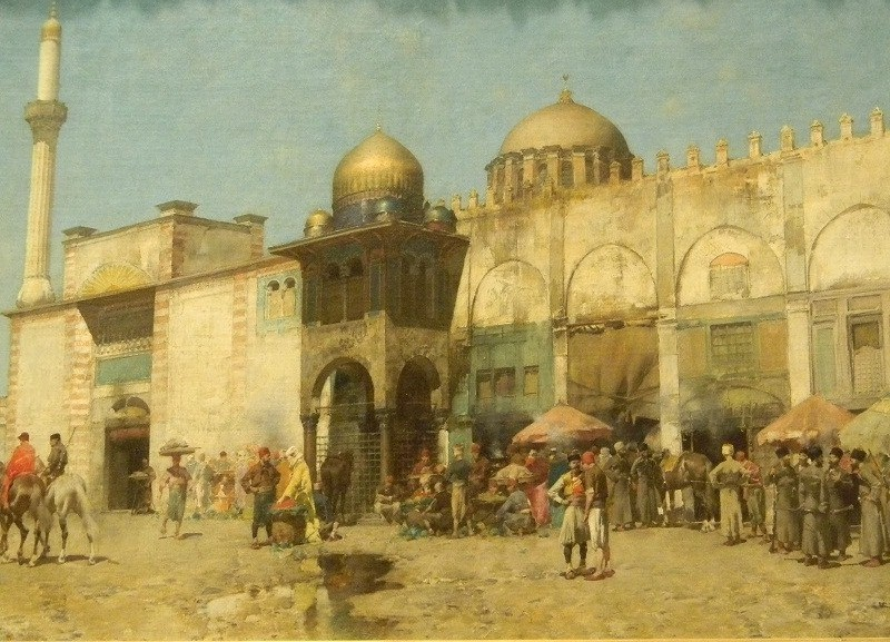 Une mosquéelabel QS:Lfr,"Une mosquée"